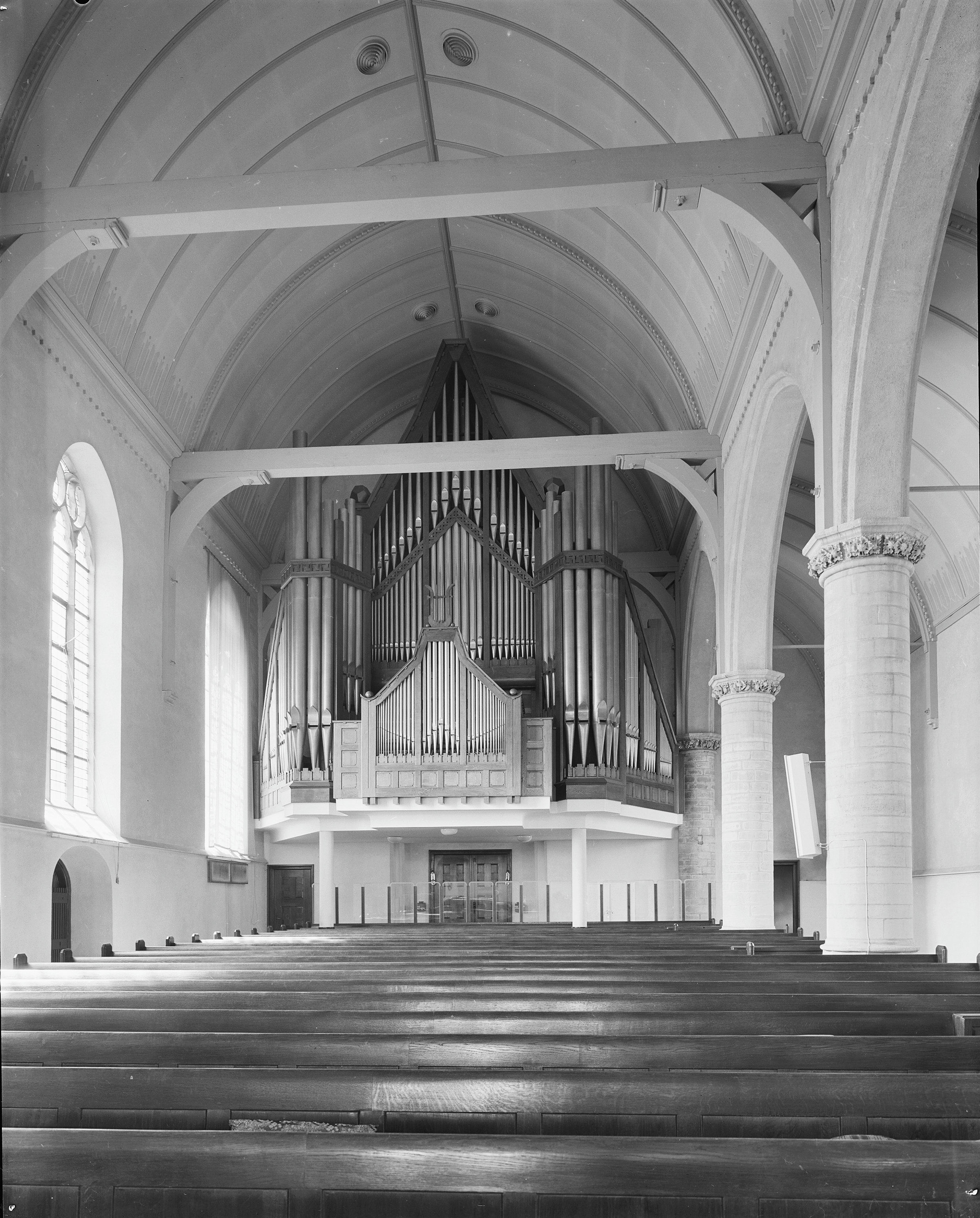 Nederlands Hervormde Kerk: orgelfront